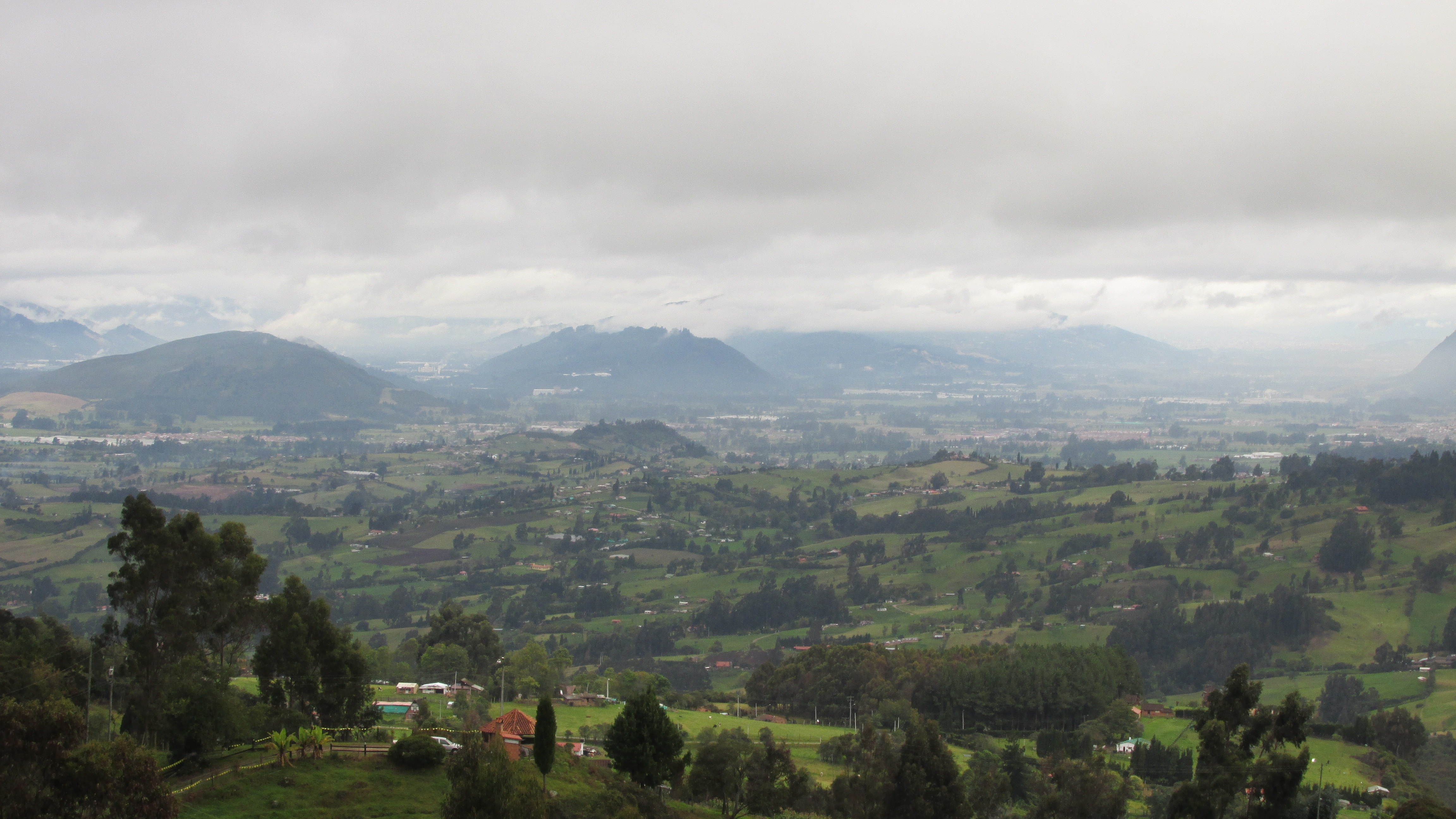 Esta fotografía fue tomada en el municipio colombiano con código 25200.